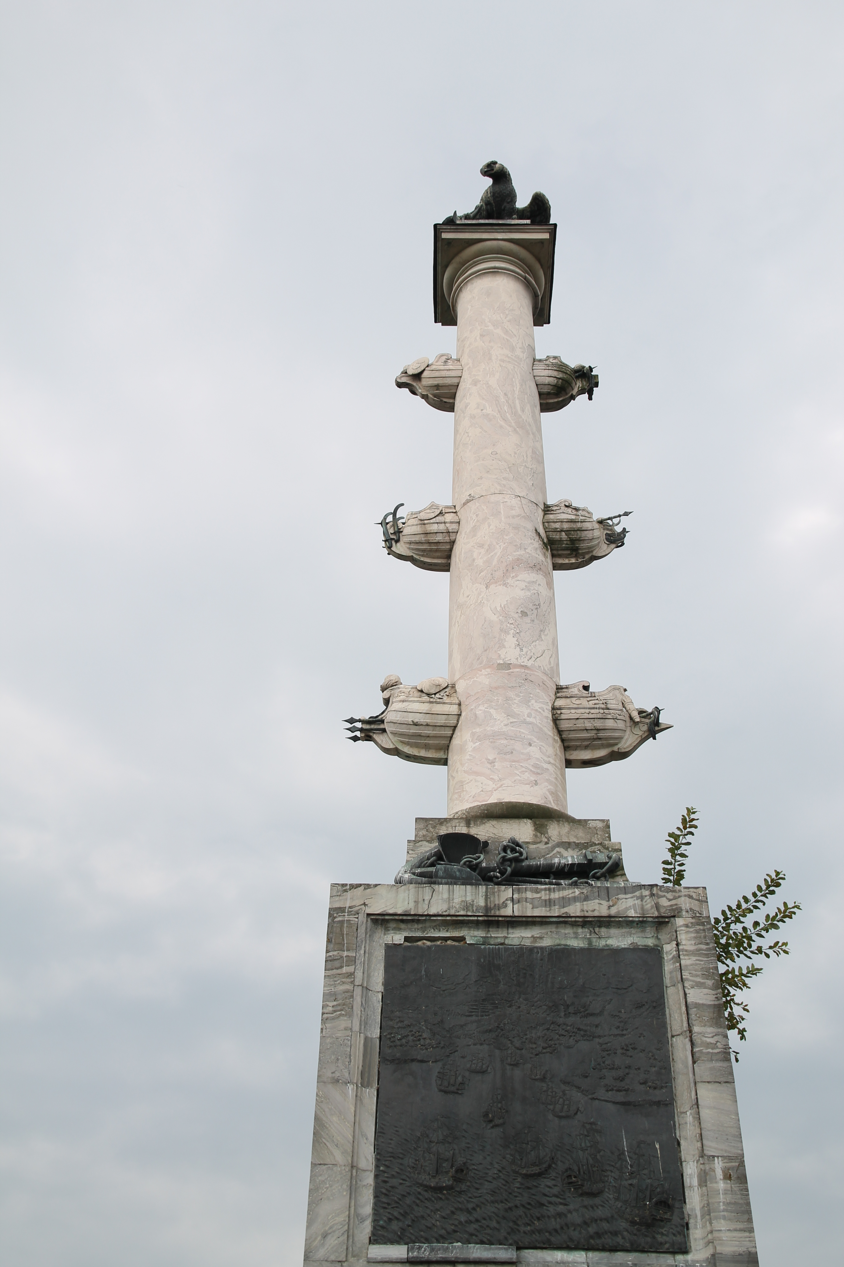 Чесменская (Орловская) колонна: Екатерининский парк, Большой пруд, Пушкин, Пушкинский район, Санкт-Петербург